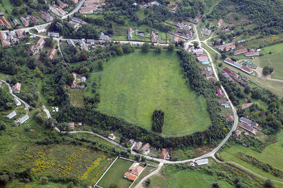 Az abaújvári földvár - ispánsági központ légi fotón